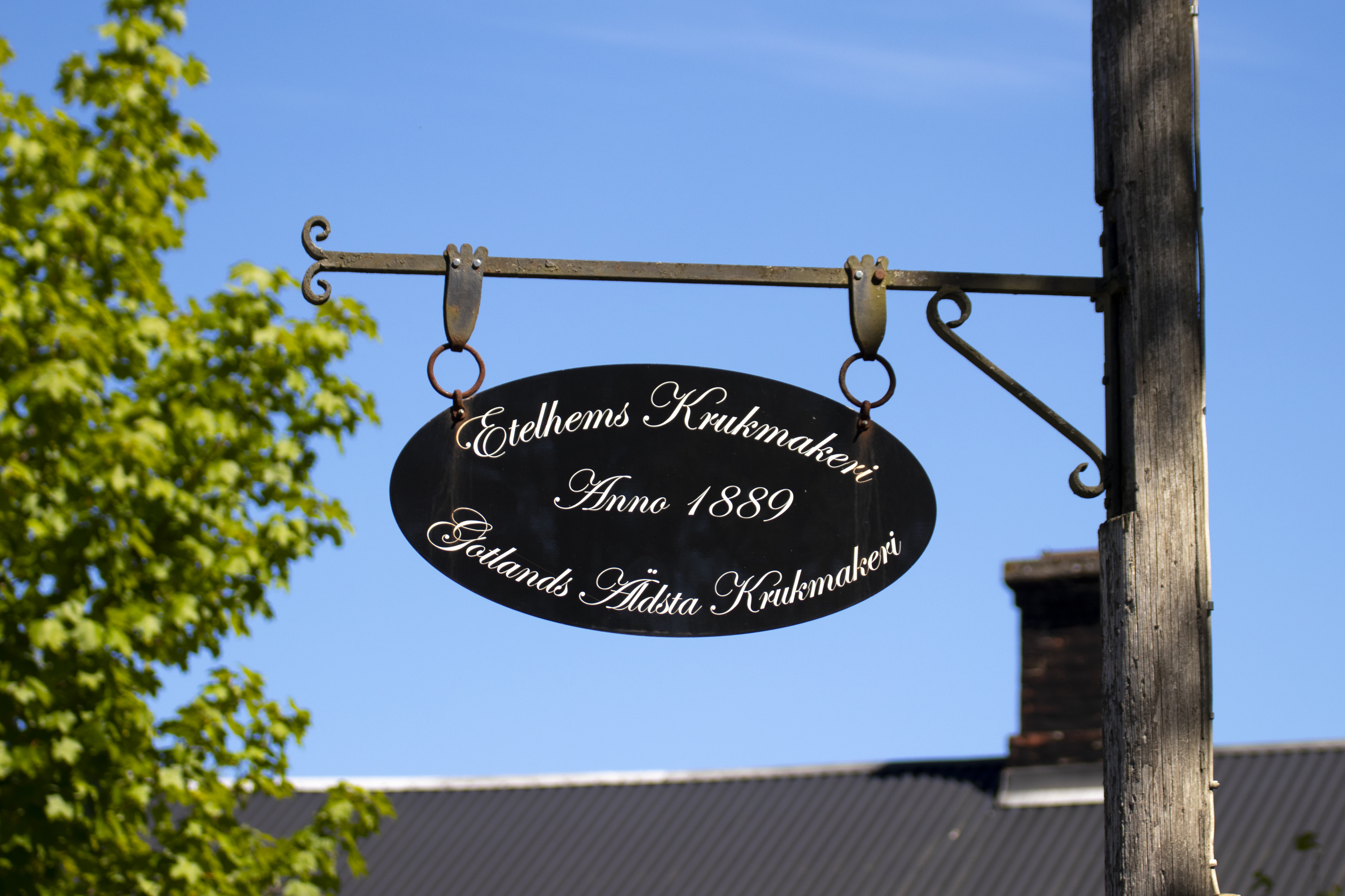 Cartel da olaría Etelhems krukmakeri, a máis antiga da illa sueca de Gotland.